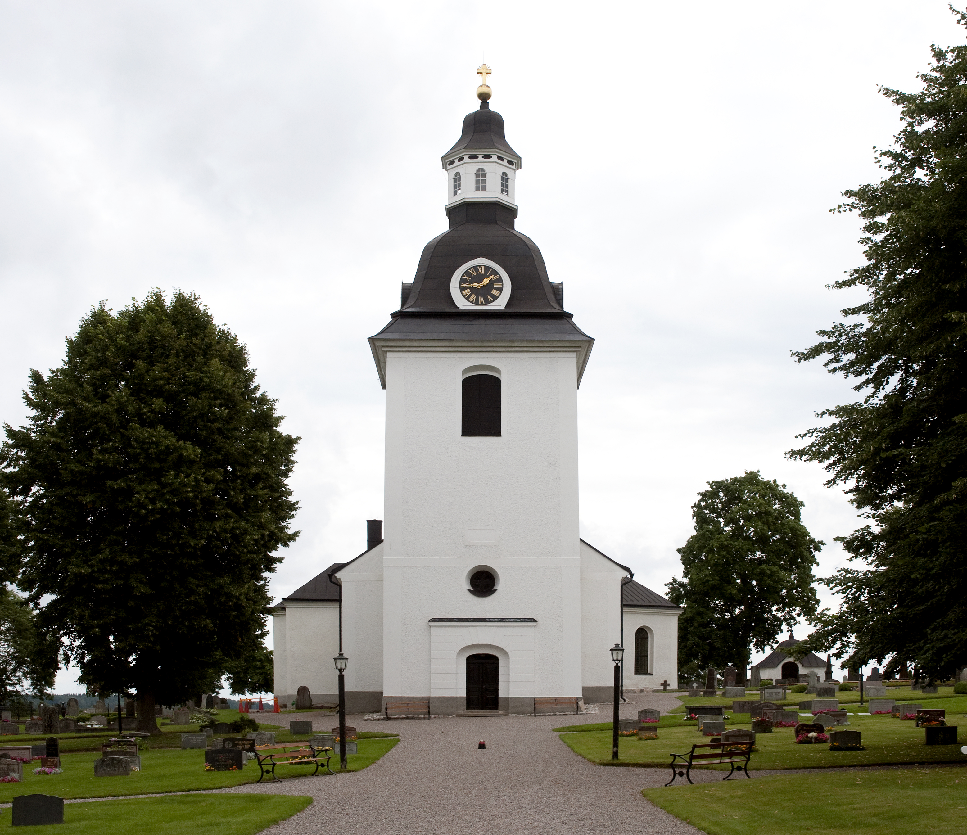 Skedevi kyrka från öster